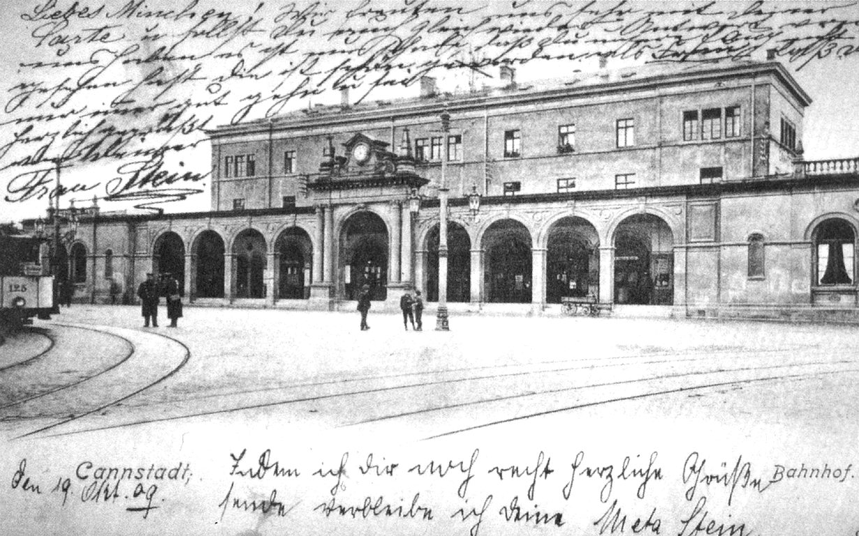 Bahnhof in Cannstatt, Postkarte mit Ansicht der Stadtseite.